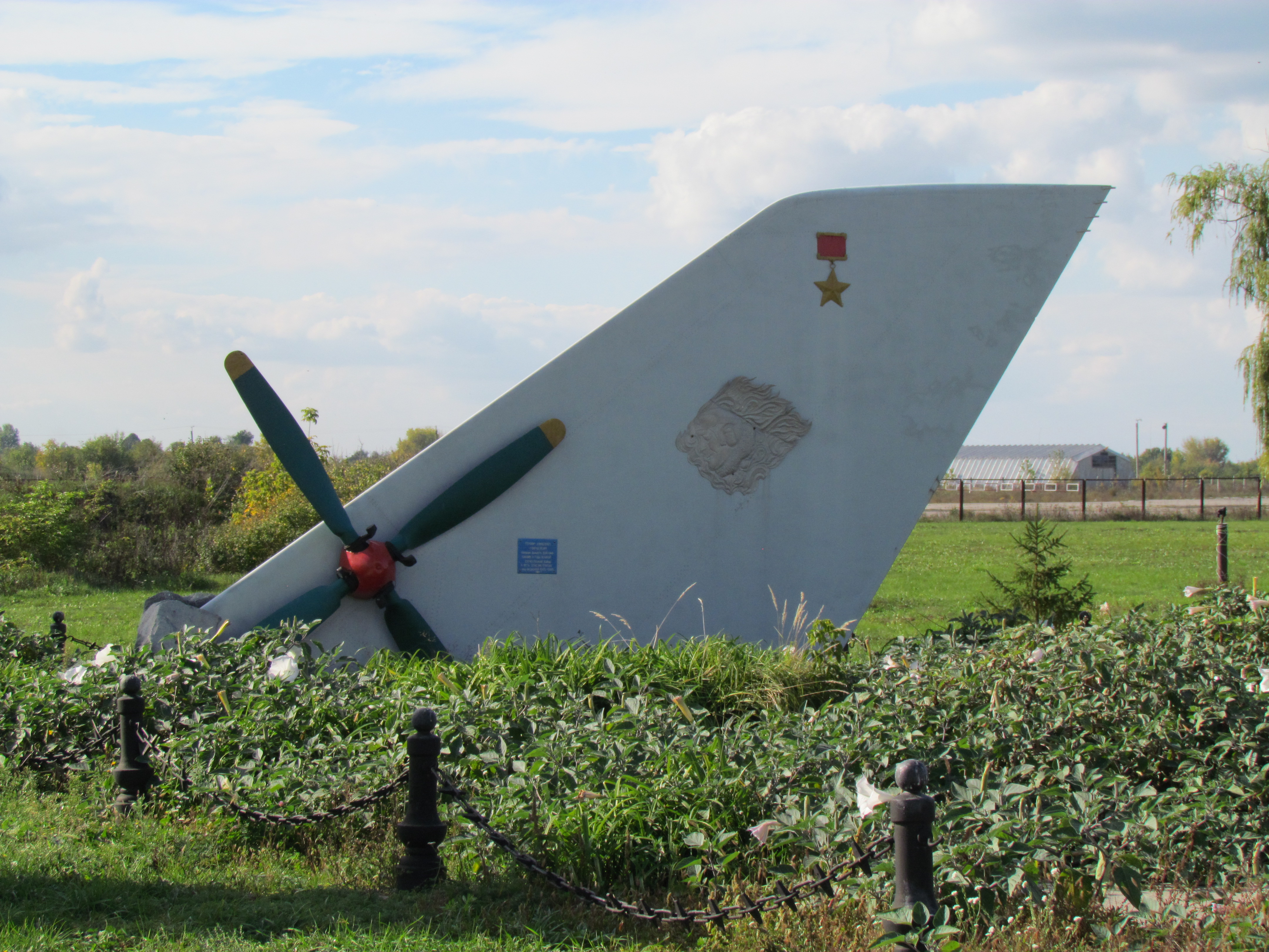 Меморіальний комплекс: військові літаки, кіль літака, пропелер, ракета КСР-5, космічний апарат, пам’ятний знак зенітницям.